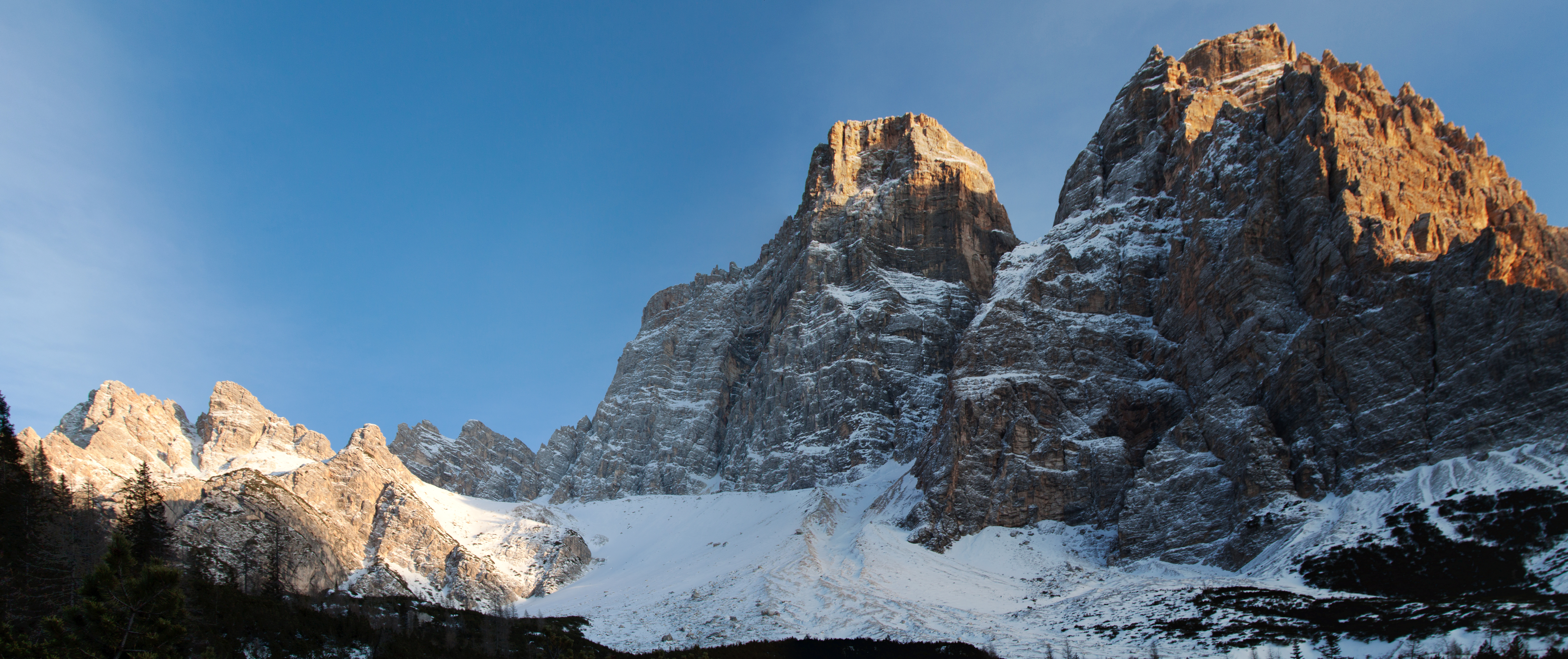 Monte Pelmo, Zoldo Alto, Belluno, Veneto